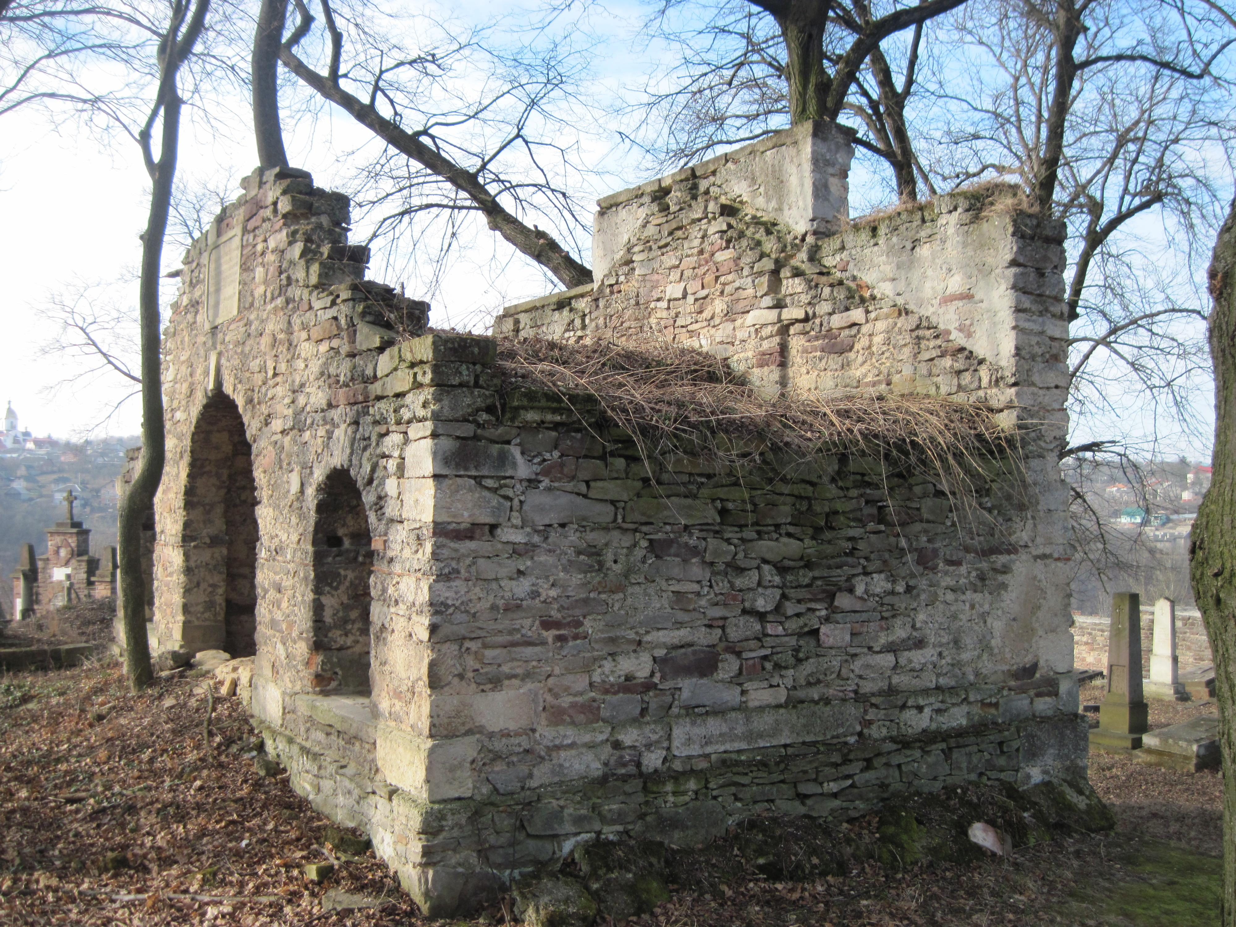 Каплиця-усипальниця графів Павела та Каєтана Потоцких, справа від каплиці, зліва біля нагробку у вигляді обеліска - надгробок-плита ц.-к. старости, почесного громадянина Бучача Еміля Шутта, лютий 2015